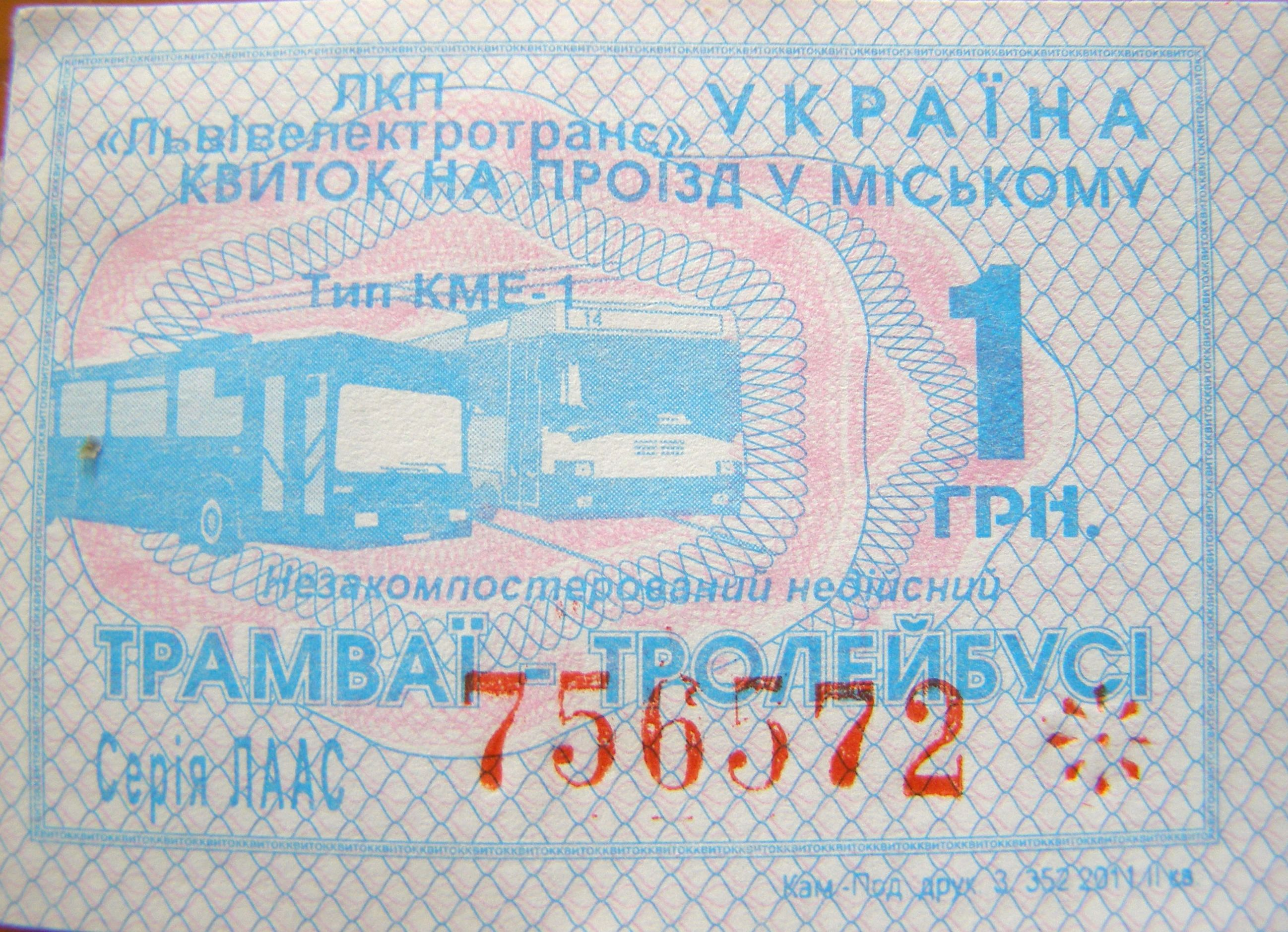 Квиток на трамвай і тролейбус (Львів)